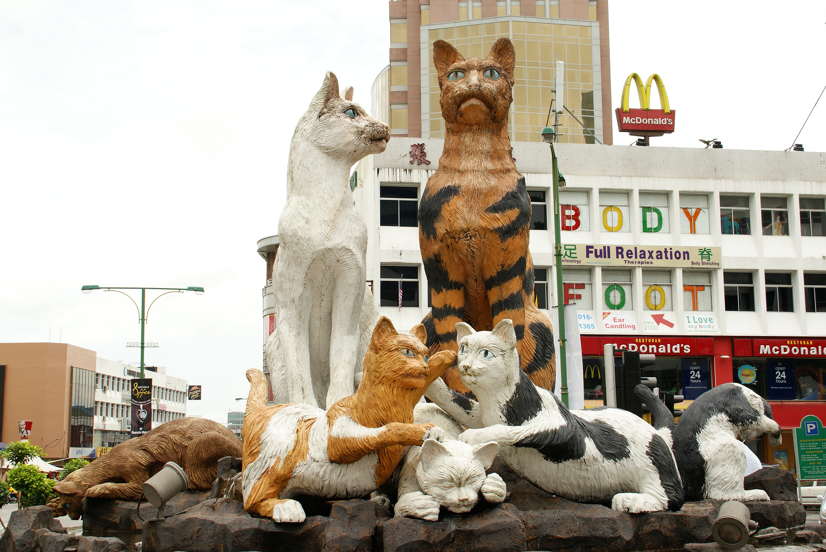 Cat Statue.(Kuching, Sarawak, Malaysia)